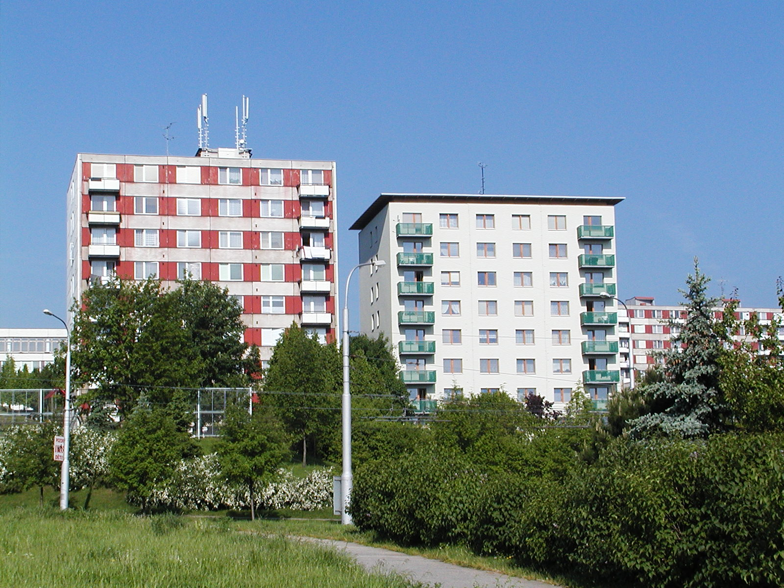 Vpravo v popředí regenerovaný panelový dům do nízkoenergerického standardu v Novém Lískovci, vlevo dům nezateplený, neregenerovaný